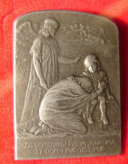 značka 37. landwehr pukovnije iz Dubrovnika za pomoć obiteljima palih vojnika